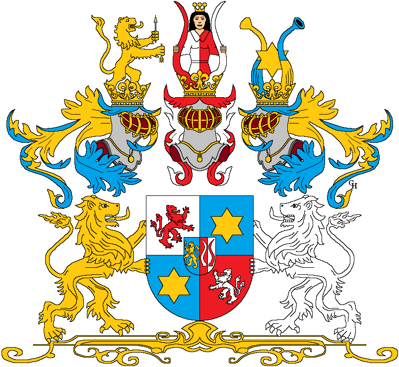 Wappen des Dr. Art(h)ur Ritter von Polzer (1870–1945), ehemaligen Kabinettsdirektors von Kaiser Karl I., verliehen anlässlich seiner Erhebung in den österreichischen Grafenstand samt Namens- und Wappenvereinigung "Polzer-Hoditz und Wolframitz" 1917. Zeichnung von Gerd Hruška ( Für weitere Informationen zu dieser Standeserhebung siehe (